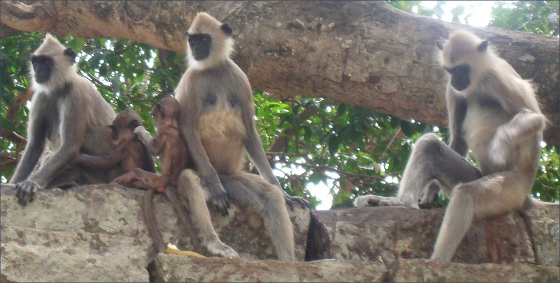 Mones d'Sri Lanka, foto feta per J. Ollé el juliol del 2006